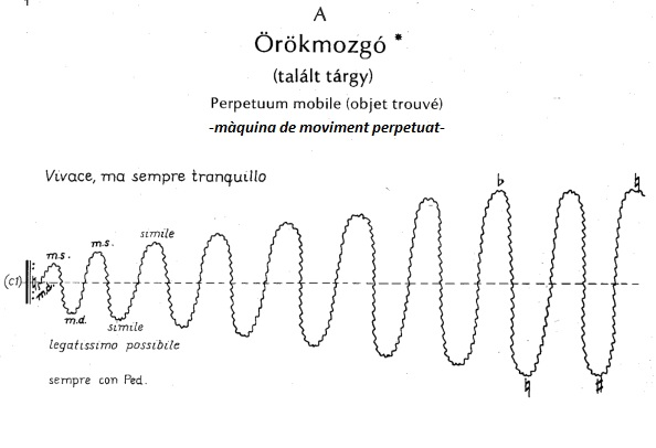 Una forma d'escriptura que trobem a Játékok